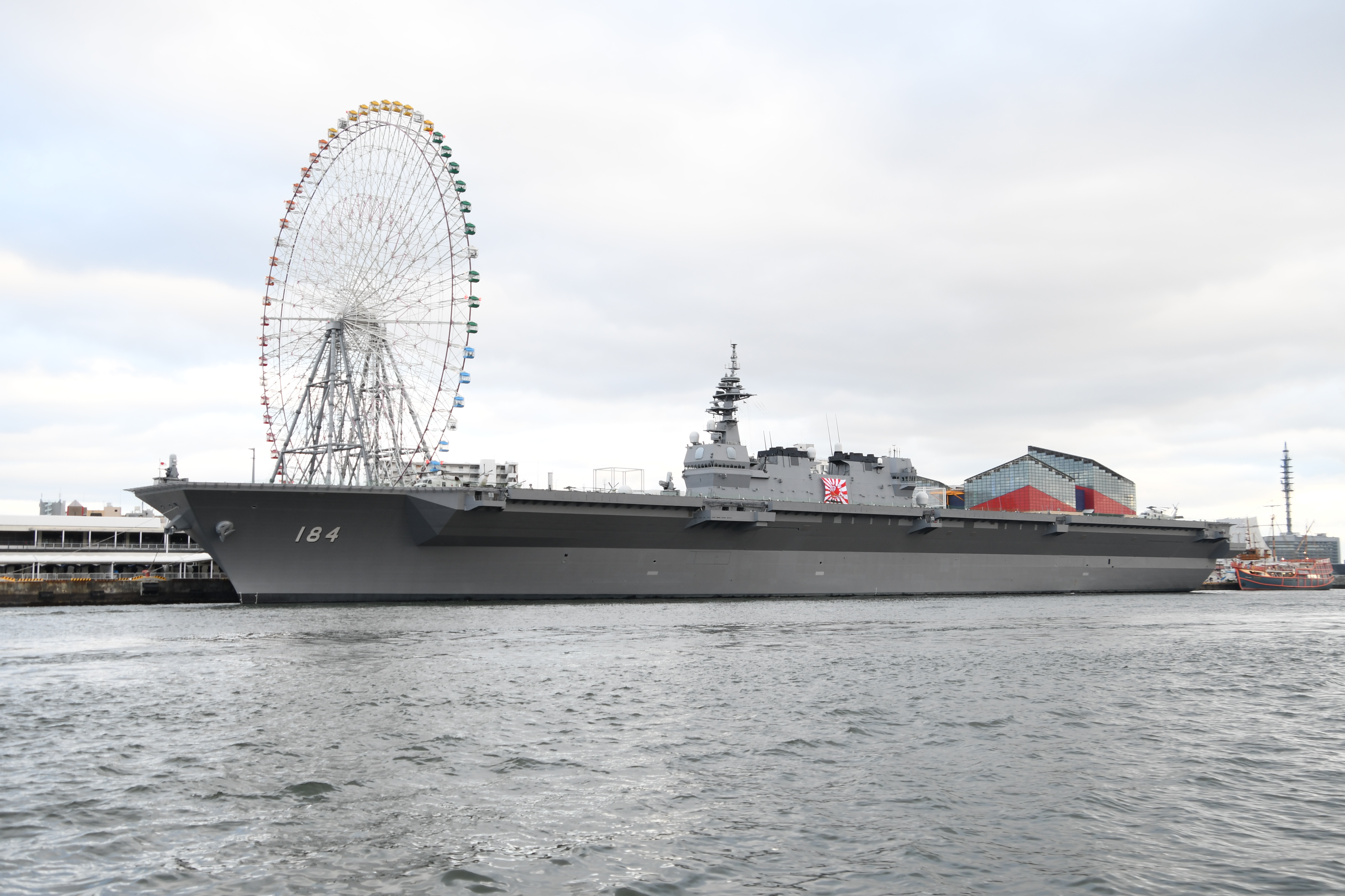 海上自衛隊 ヘリコプター搭載護衛艦かが（DDH-184） 左舷前面。2018年5月19日 大阪港にて。